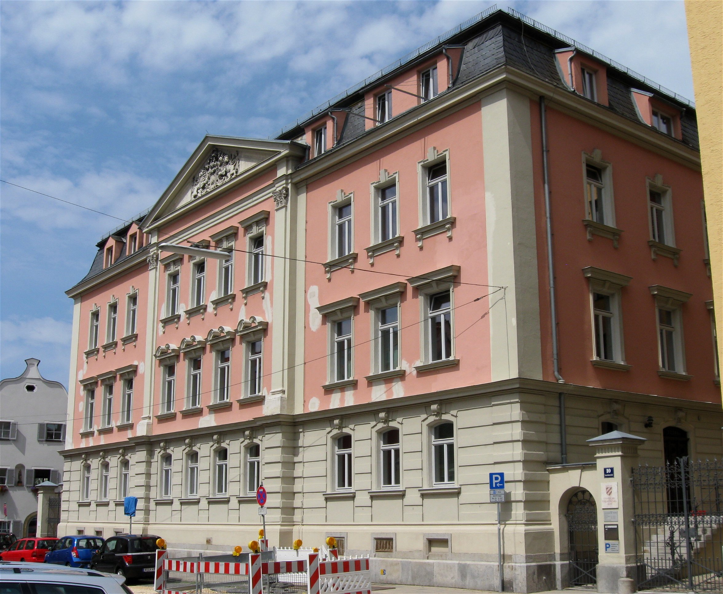 Franziskanerplatz 10. Ehem. Amtsgericht, jetzt Staatl. Vermessungsamt, dreigeschossiger und gestelzter Mansardwalmdachbau mit übergiebeltem Mittelrisalit und Pilastergliederungen über gebändertem Erdgeschoss, neubarock, 1893 anstelle des ehem. Franziskanerklosters erbaut.